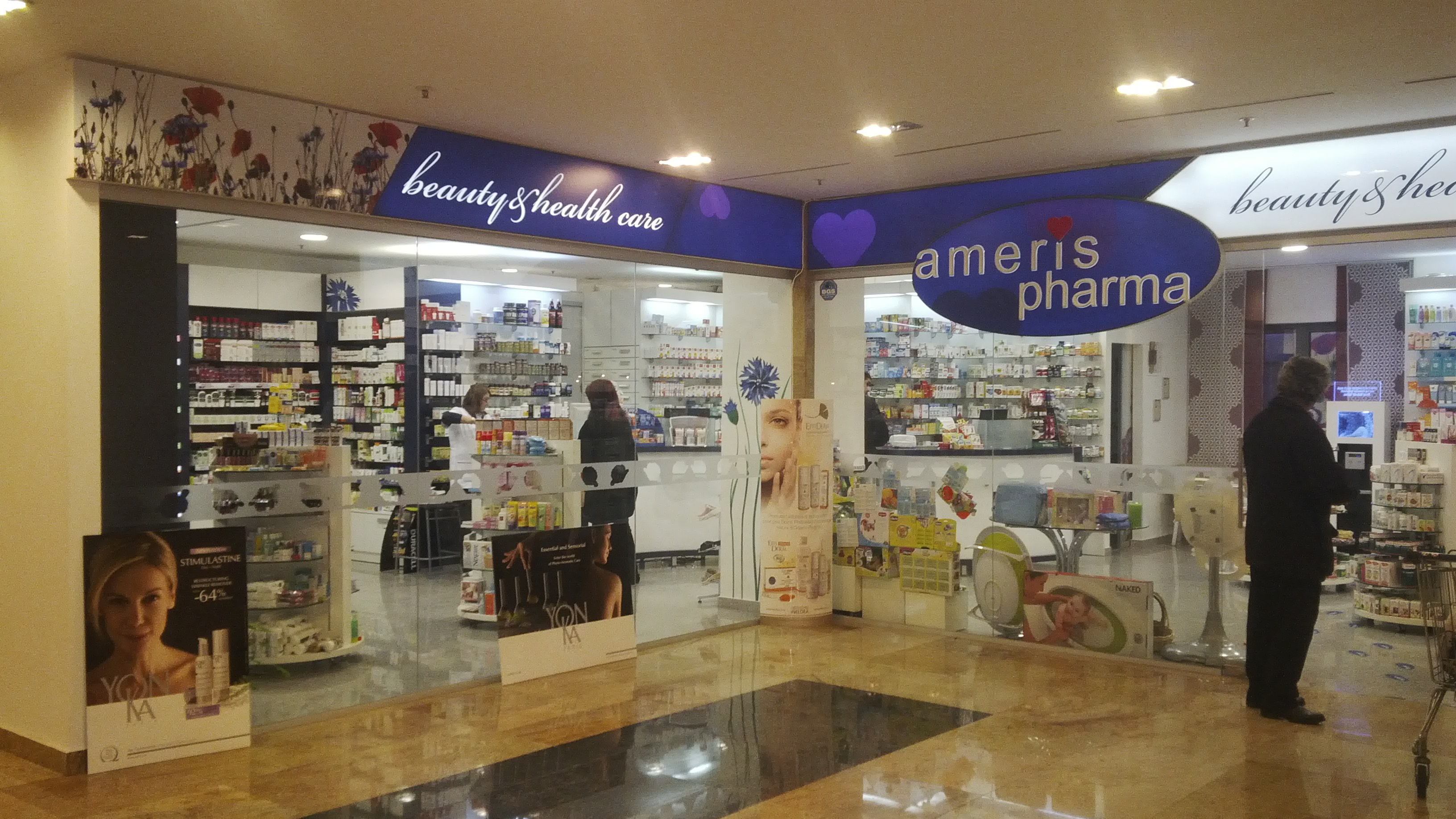 Farmacia Ameris